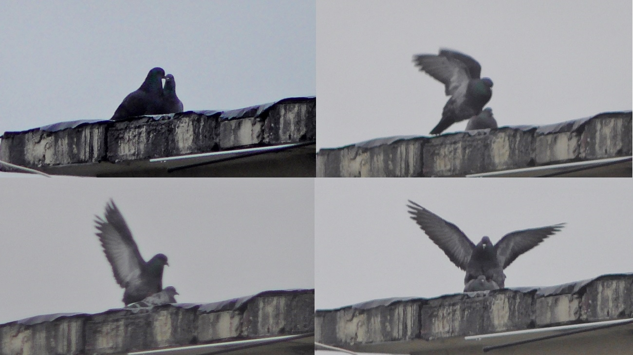 Pigeon mating